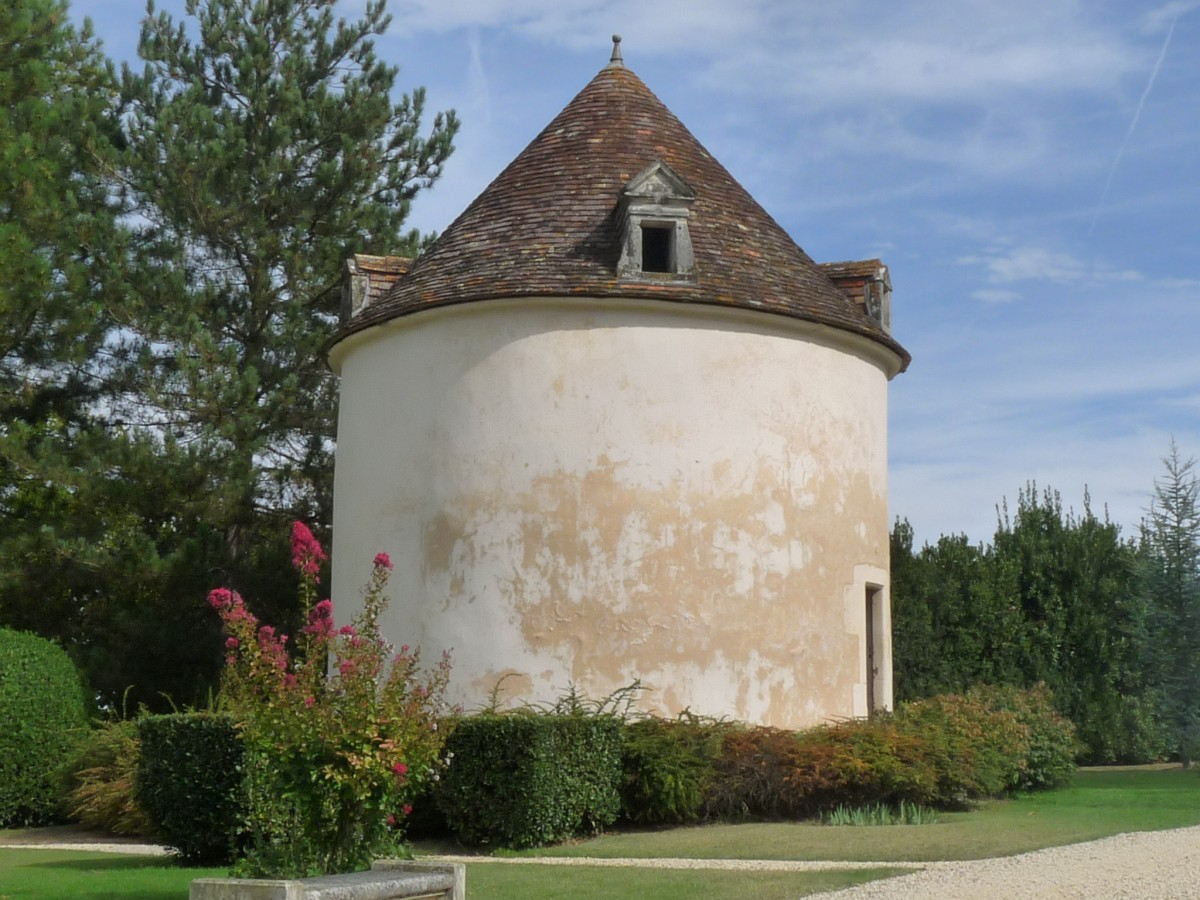 Pigeonnier (1740), château de Beaulon, St-Dizant-du-Gua, Charente-Maritime, France